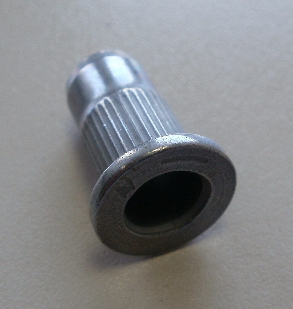 Nitonakrętka